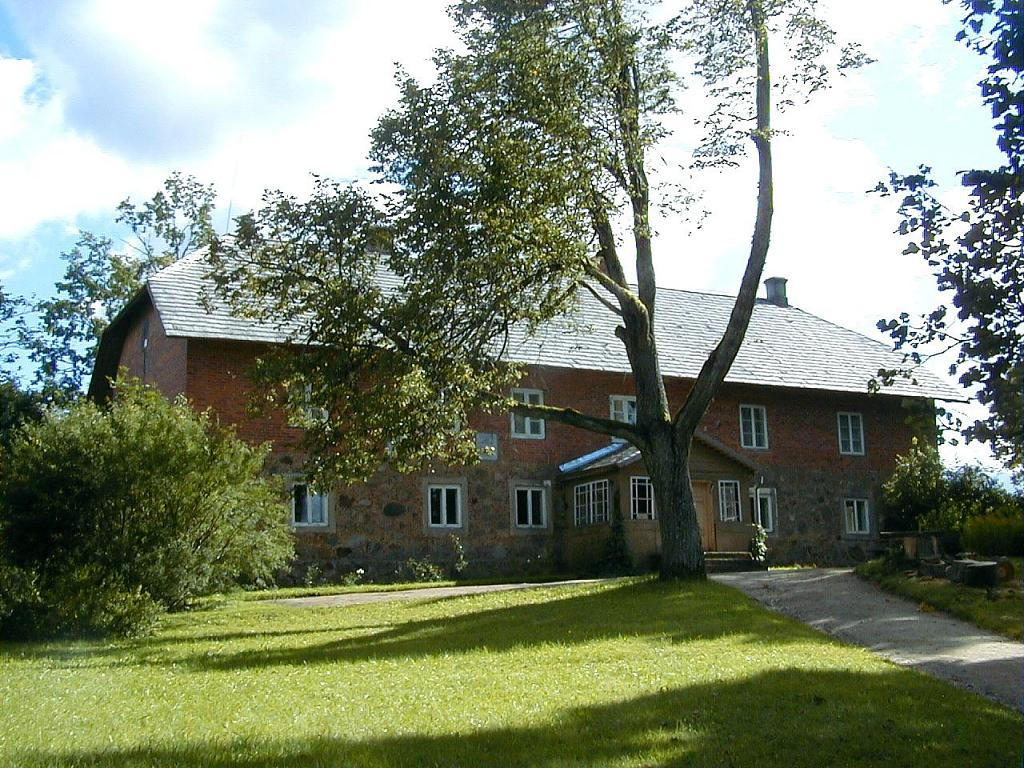 Jāņaskola - E.Dārziņa un J.Surabkalna muzejs 2003-09-06